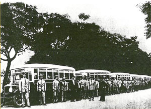 primeiros onibus fotografados na cidade do rio de janeiro, em 1932.